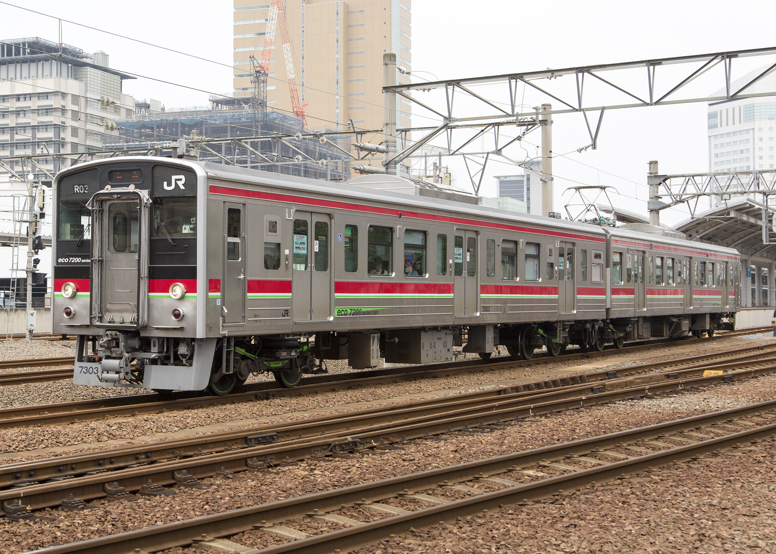 JR四国 7200系 7303+7203 高松駅付近にて